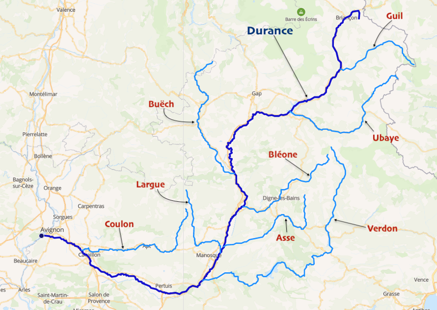 carte réalisée sur umap This map may be incomplete, and may contain errors. Don't rely solely on it for navigation.